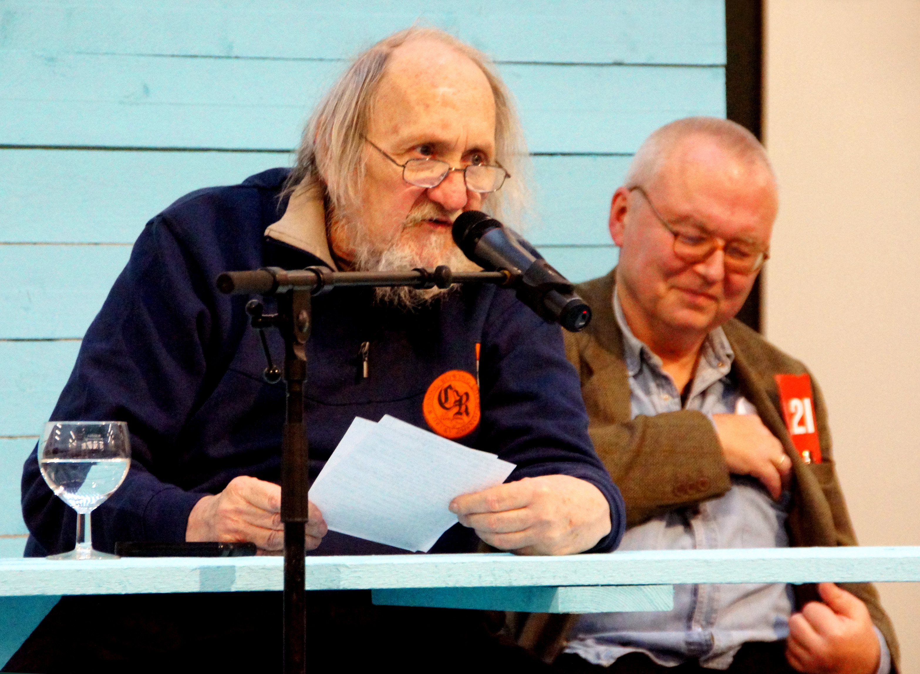 Unter dem Titel "Eine Versammlung kommt selten allein" lasen, anlässlich des 40. Jahrestages der Gründung, Lyriker und Lyrikerinnen der Grazer Autorinnen Autorenversammlung im "Salon für Kunstbuch im 21er Haus". Abgebildete Personen: S. Dateiname.